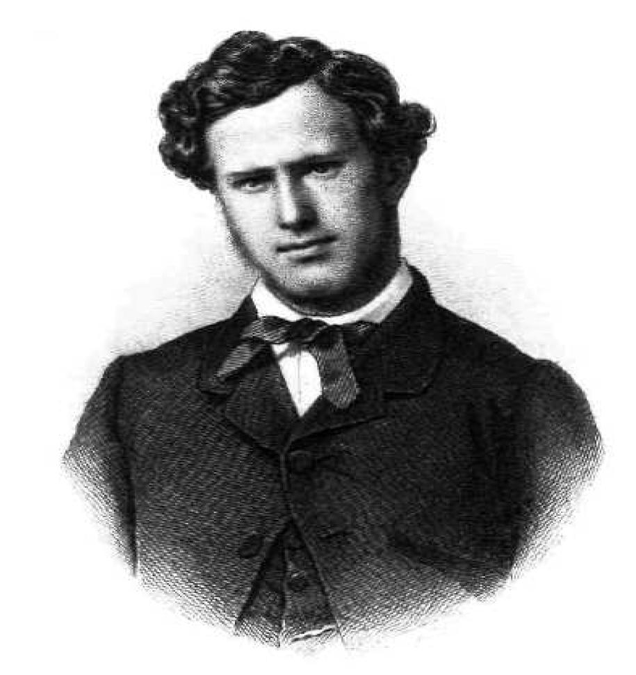 Griechischer Politiker, 19. Jahrhundert